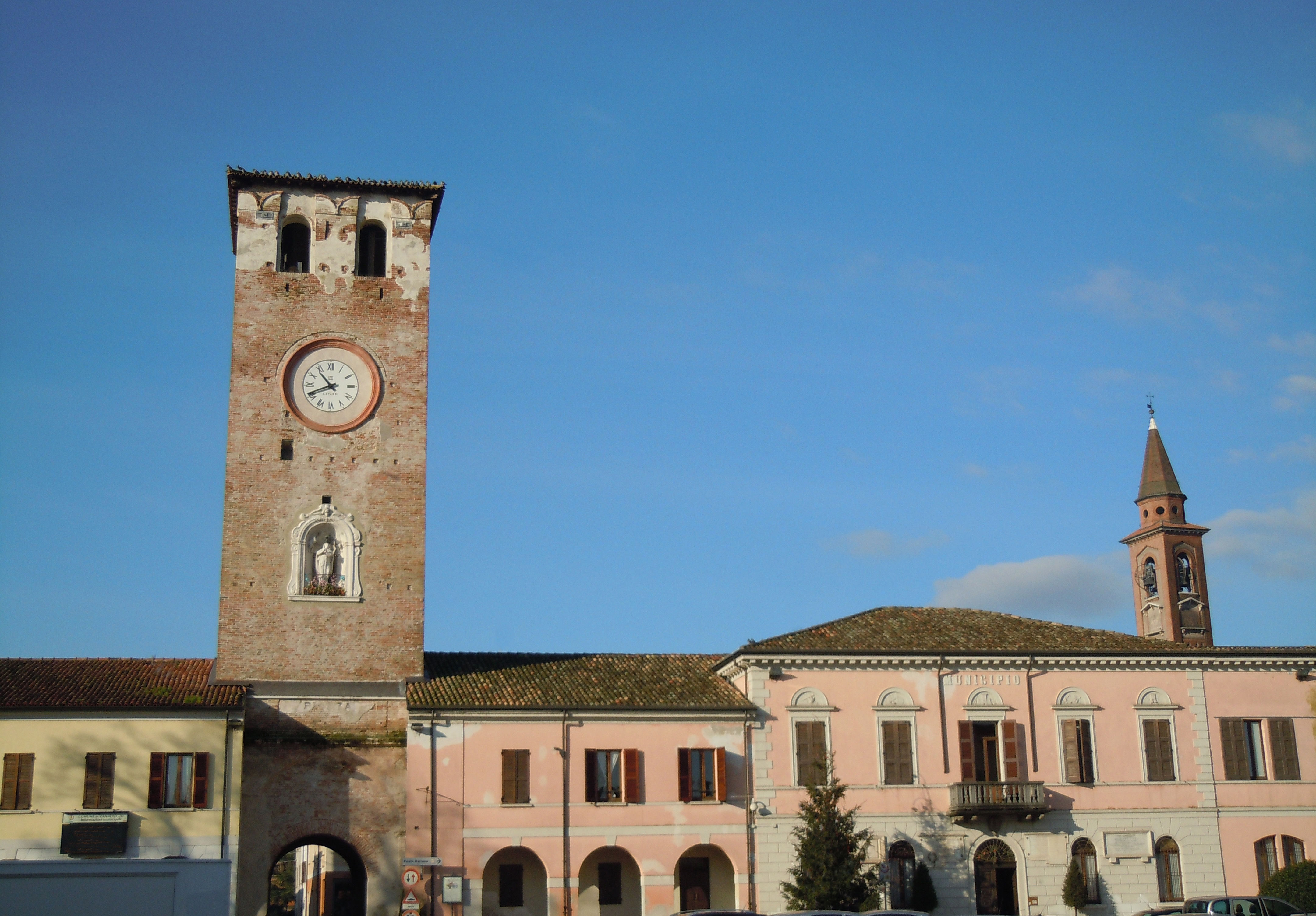 Canneto sull'Oglio, Piazza Matteotti.